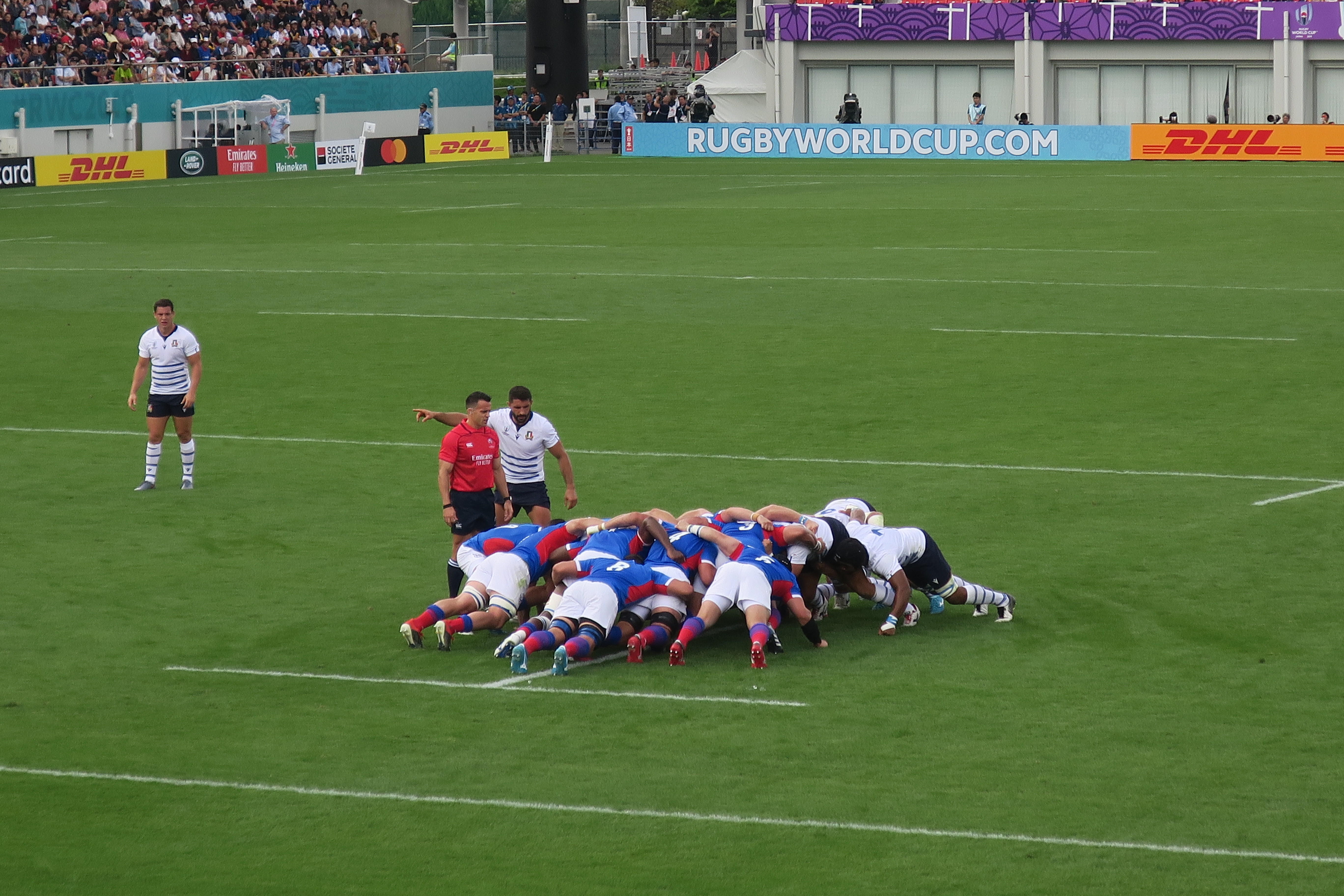 2019 ラグビーワールドカップ イタリア対ナミビア（2019年9月22日、東大阪市花園ラグビー場）